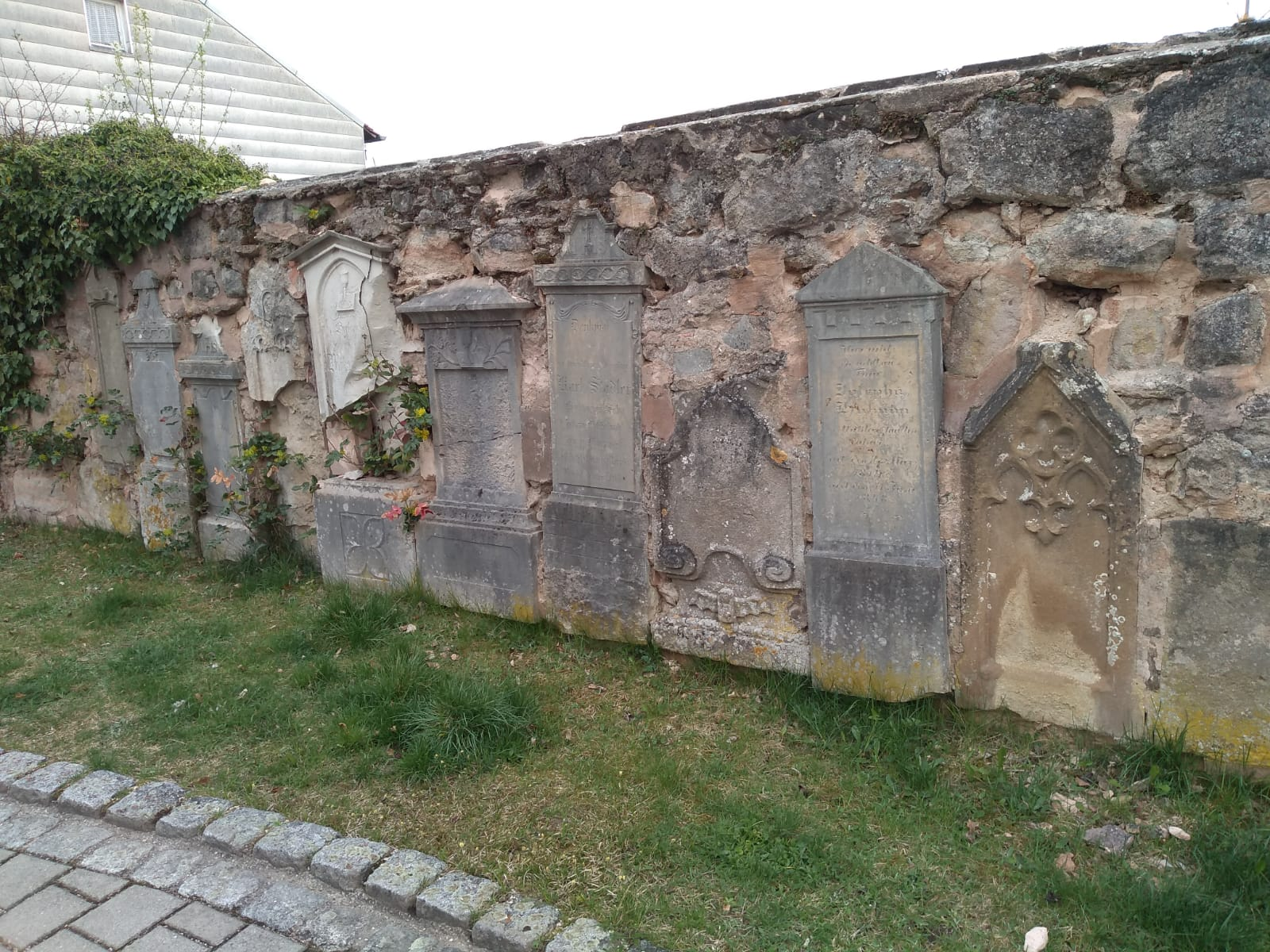 Alter Friedhof in Pleinfeld